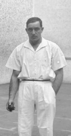 Artamendi II in 1934